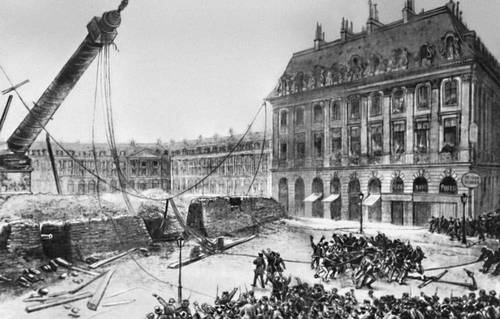 Разрушение Вандомской колонны